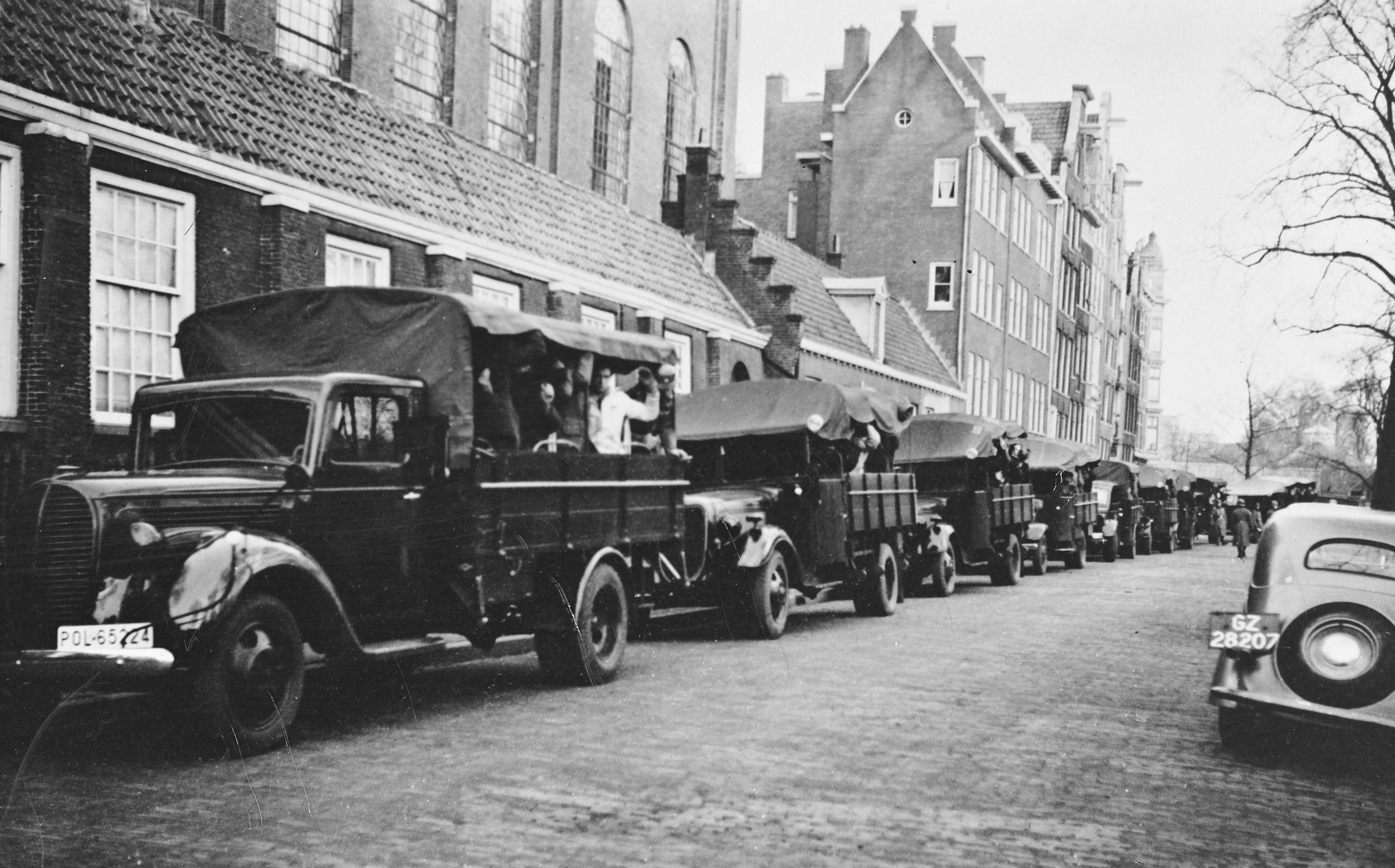 [Repronegatief 28-1-1946] Razzia's. Jonas Daniël Meijerplein te Amsterdam.